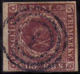 Первая почтовая марка Дании, 1851 год.